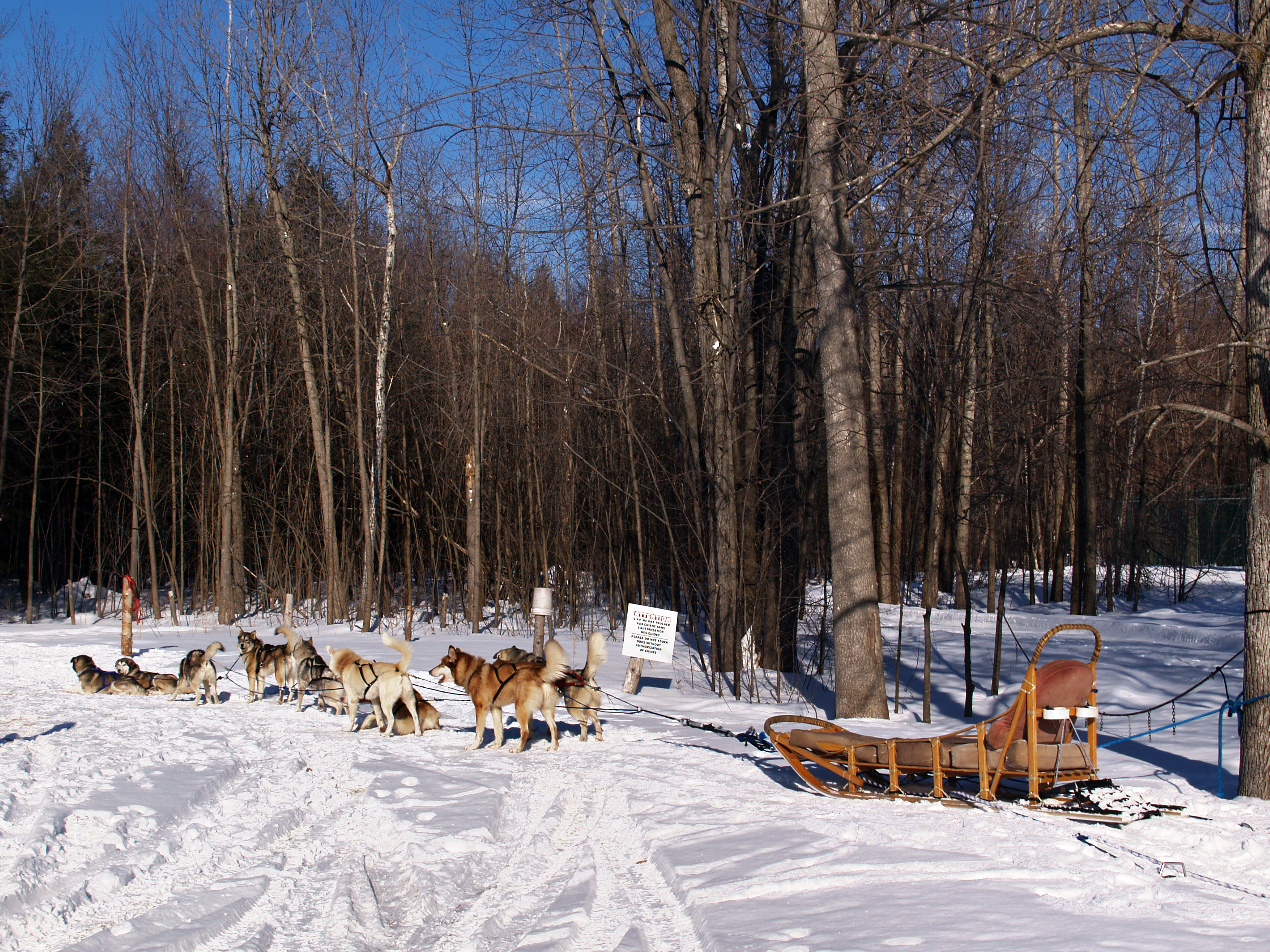 Montebello (Québec) - Randonnée en traineaux à chiens au château Montebello